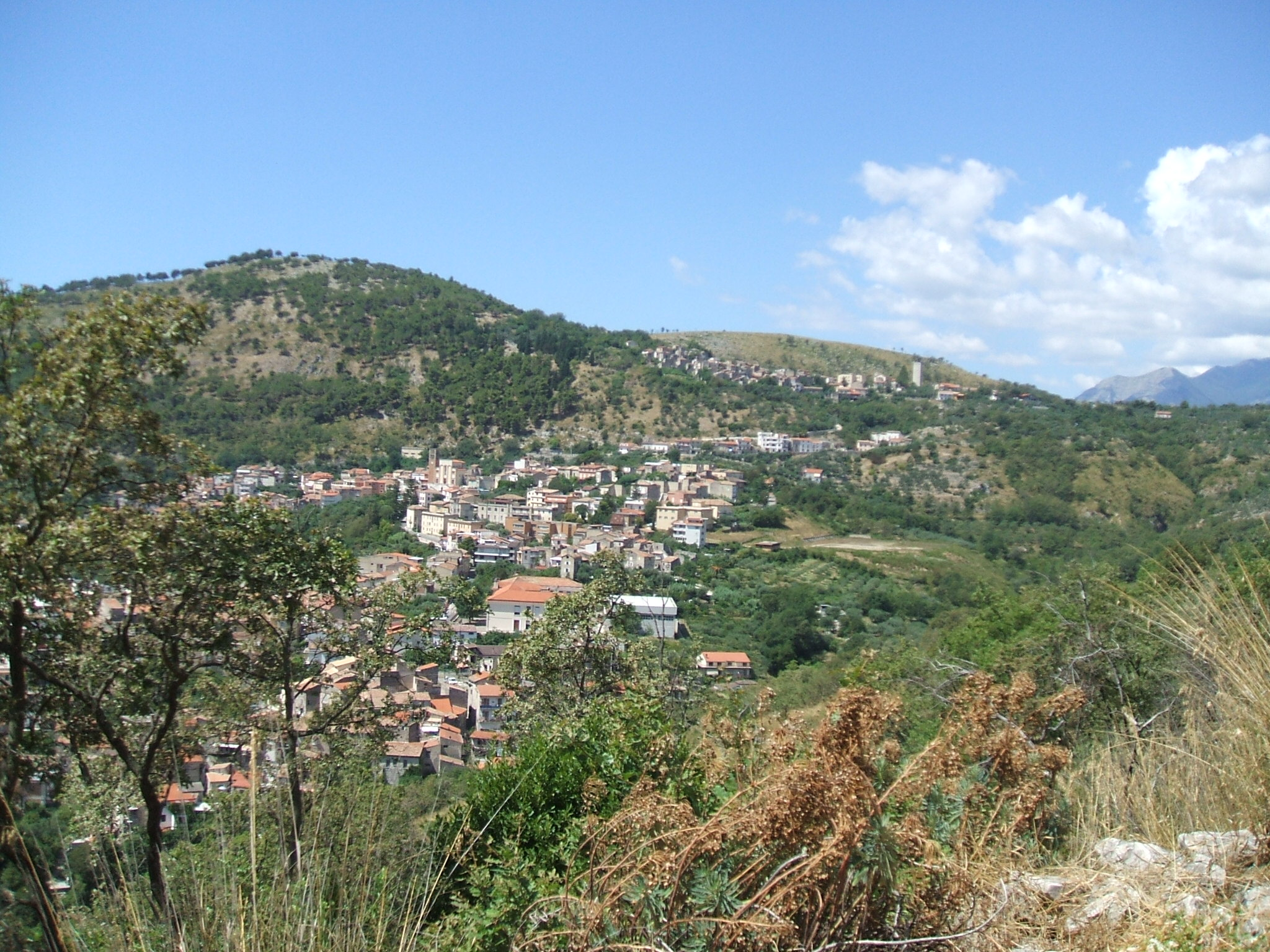 View of Santi Cosma e Damiano (LT) and Ventosa town center, Provincia di Latina, Regione Lazio (Latina Province, Latium Region, Italy).